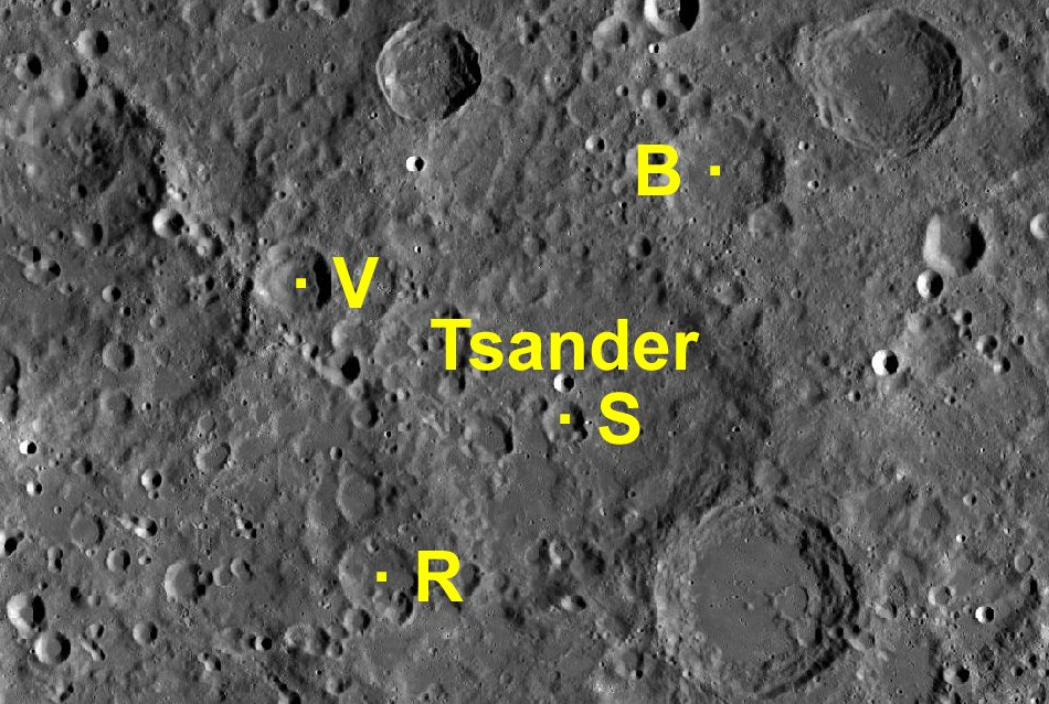 Cráter lunar Tsander. Cráteres satélite. (Imagen LRO)